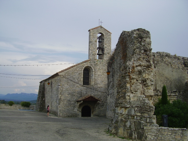 église de Sauzet (drôme)